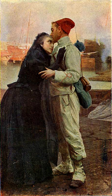 L'addio del bersagliere alla madre , olio su tela, di Vincenzo Montefusco (1852-1912). Immagine tratta dal libro: Ferraris M. e Ruynat A., Fanciullezza, Fanciullezza...: letture per la nuova scuola italiana, classe quarta elementare , Firenze, Bemporad, 1925, 264 pp.